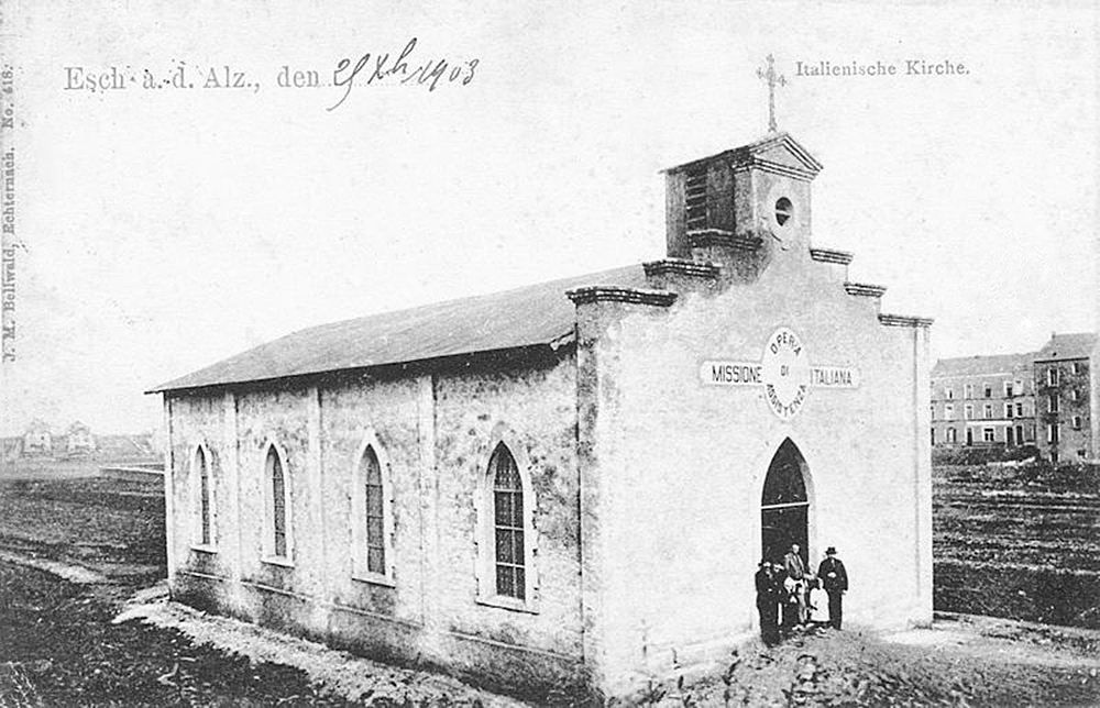 Kierch vun der italieenescher Missioun zu Esch-Uelzecht, 1903 gebaut. Foto vum J.M. Bellwald, N° 418. (D'Bild ass liicht retouchéiert, vergréissert a geschäerft.)